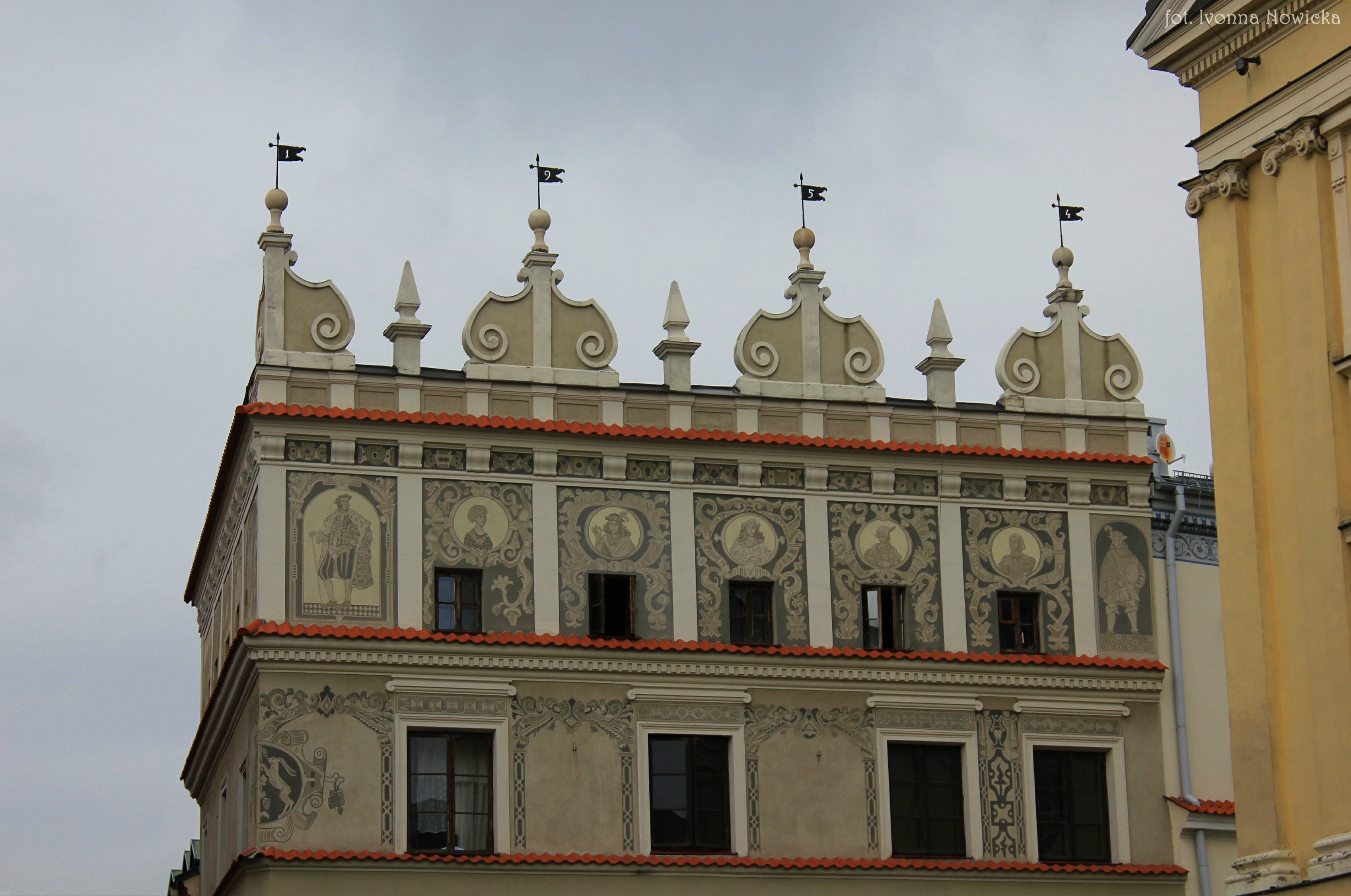 Lublin, kamienica Chociszewska, XV, XIX. Sgraffito autorstwa Heleny i Lecha Grześkiewiczów.